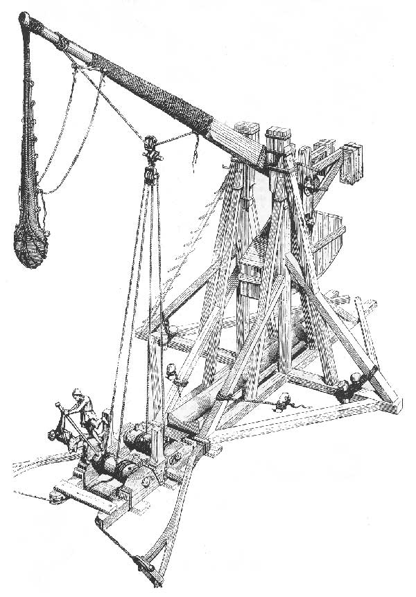 Blidenwerk